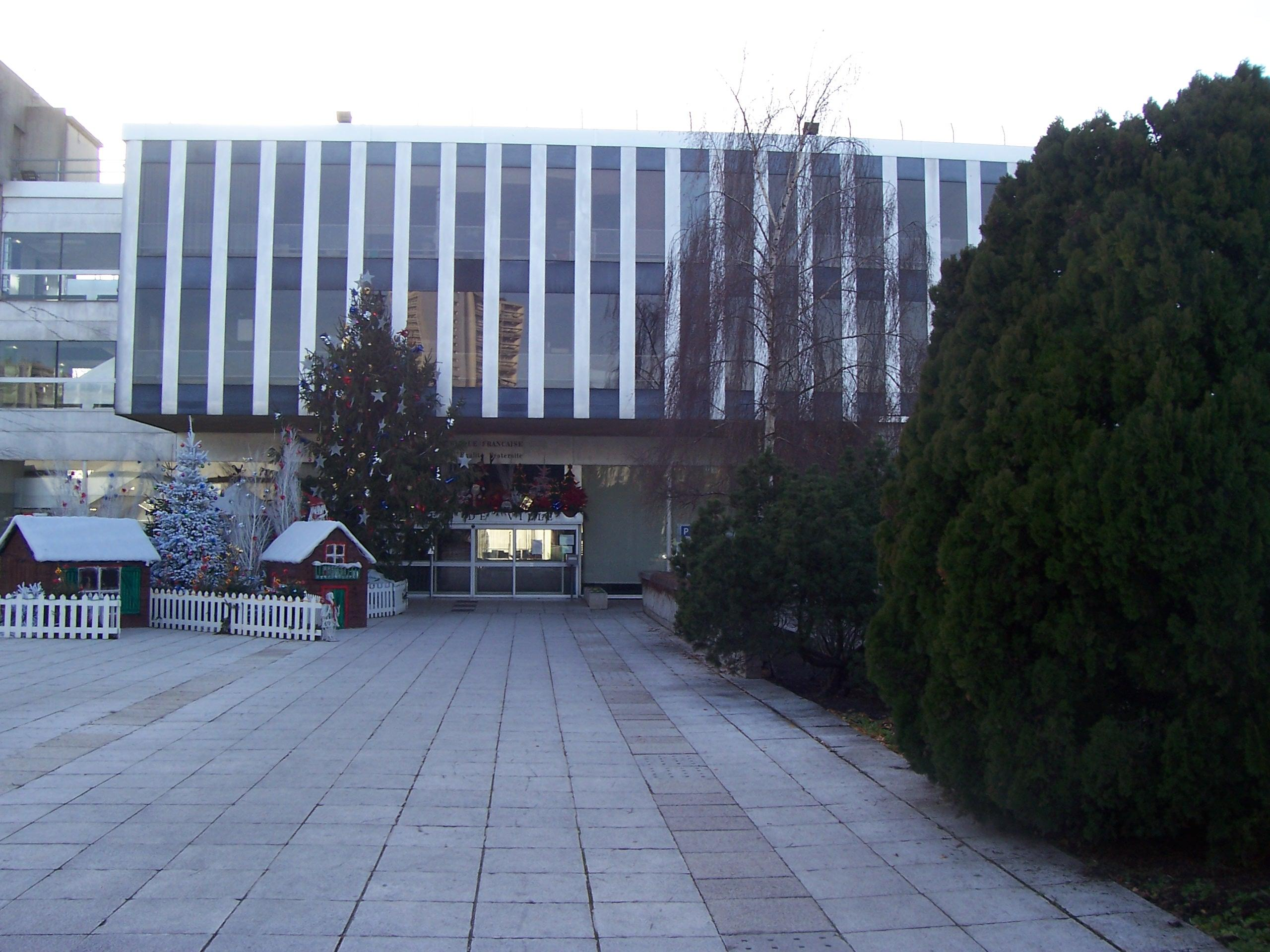 La Mairie de Fontenay-sous-Bois